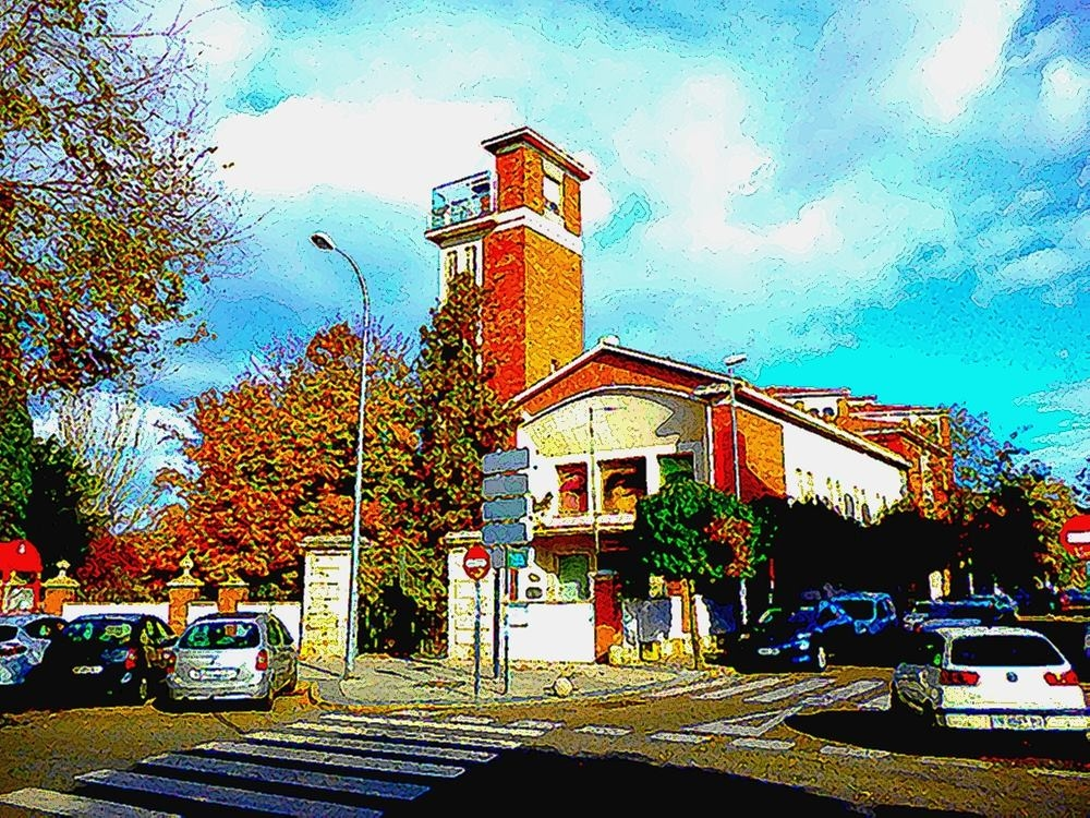 Iglesia del Complejo Dotacional de El Pilar, actual sala de exposiciones municipal Juan Carlos I de San Fernando de Henares.